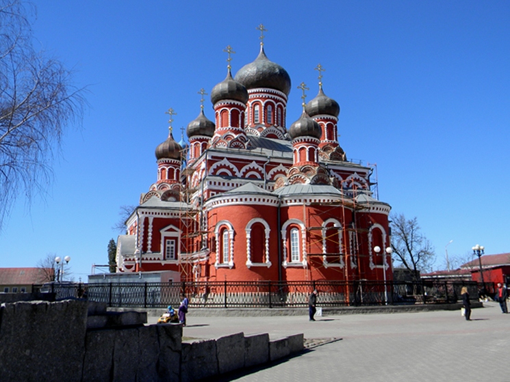 Барысаўскі Васкрасенскі сабор